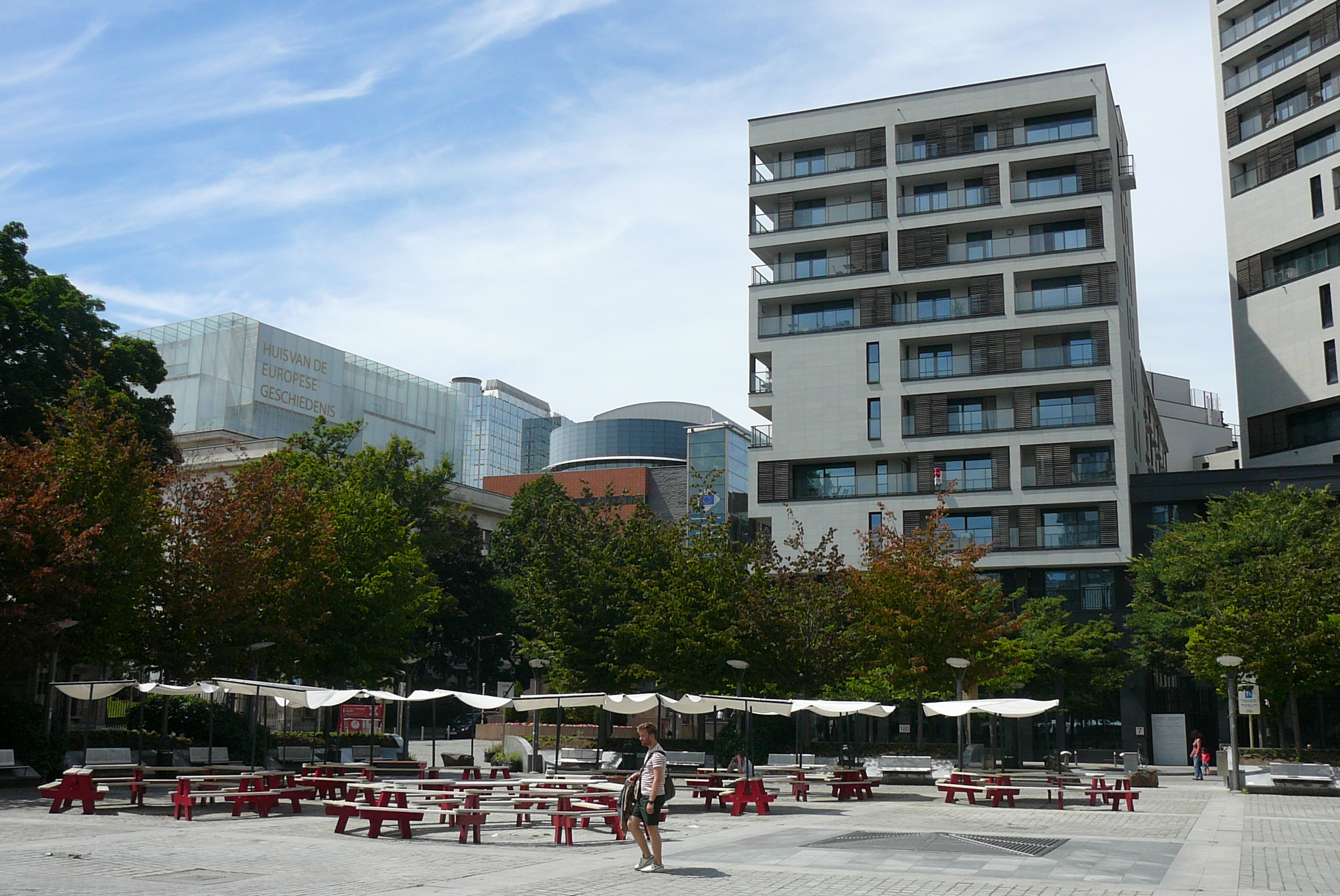 Place Jean Rey, à Etterbeek, Région bruxelloise, Belgique